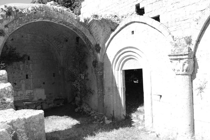 Abbazia S.Trinità su Monte Sacro a Mattinata (fg) Parco del Gargano .